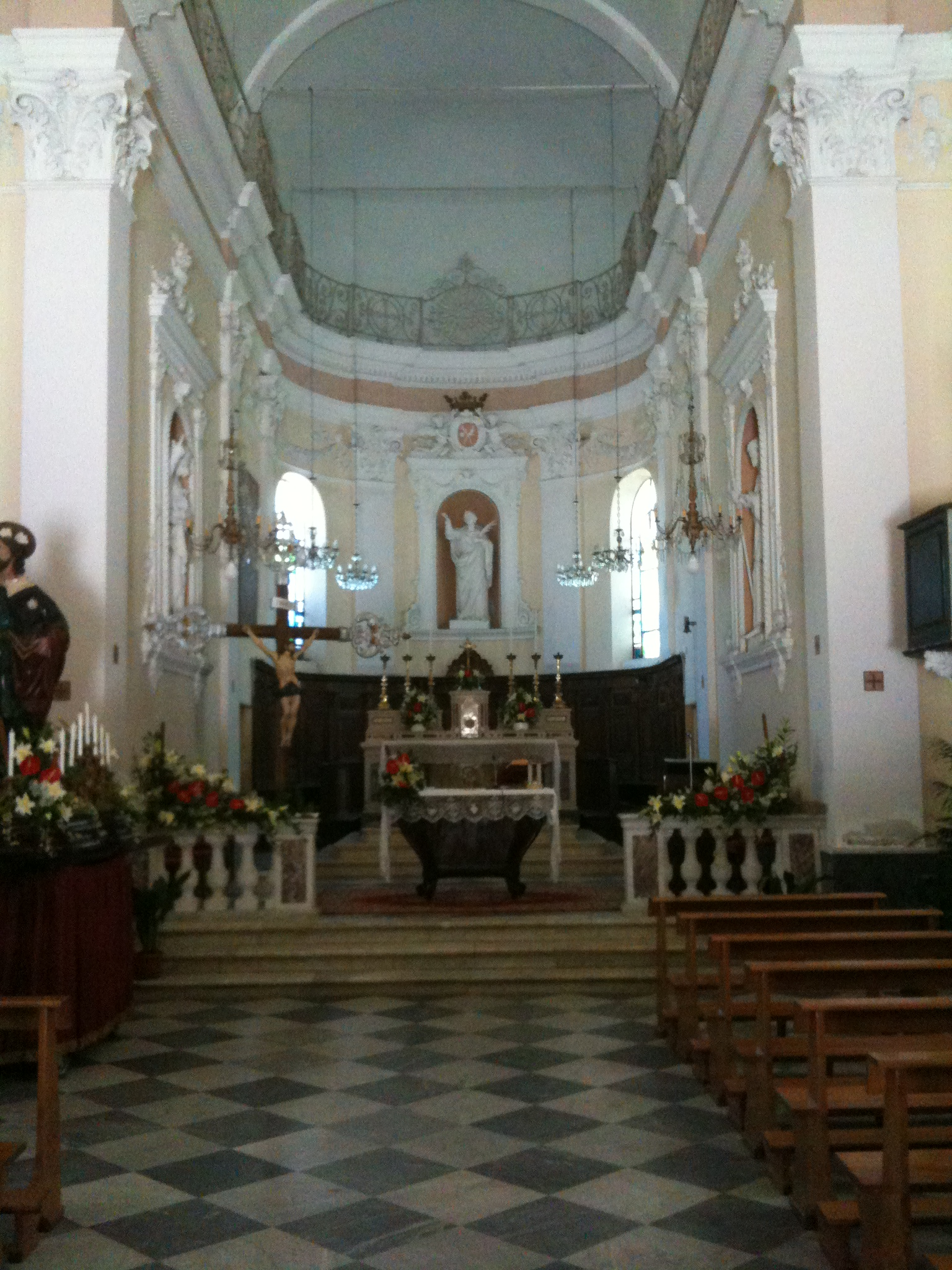 Chiesa di stella santa giustina SV (Italy), interno, presbiterio